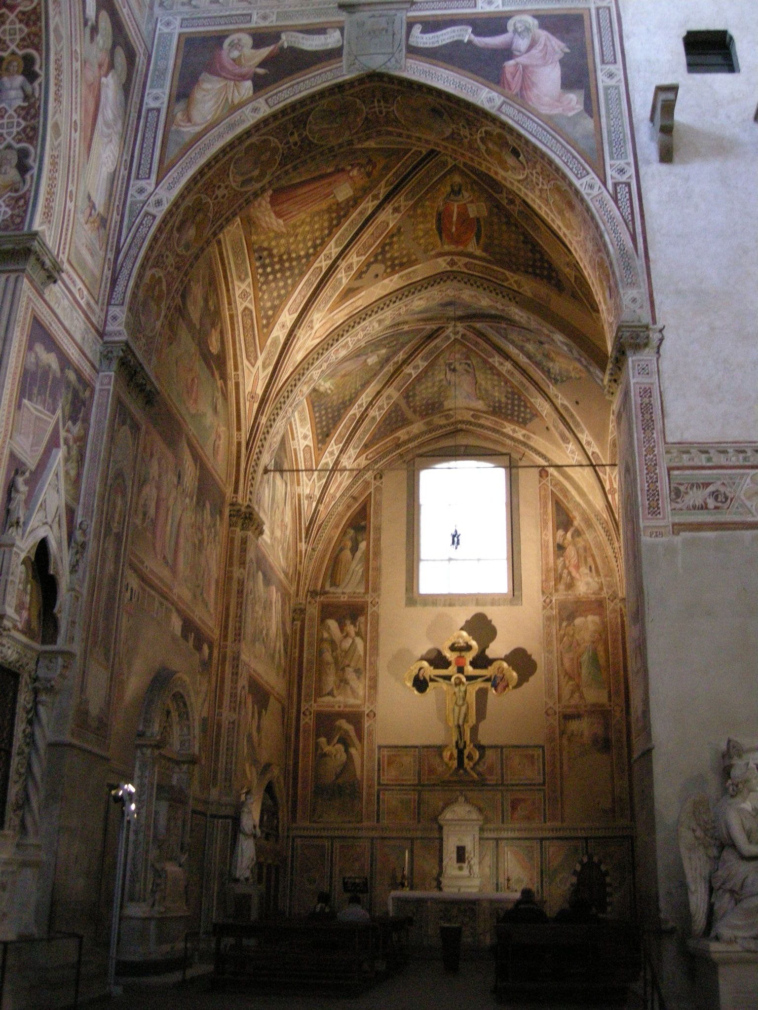 Cappella castellani 00